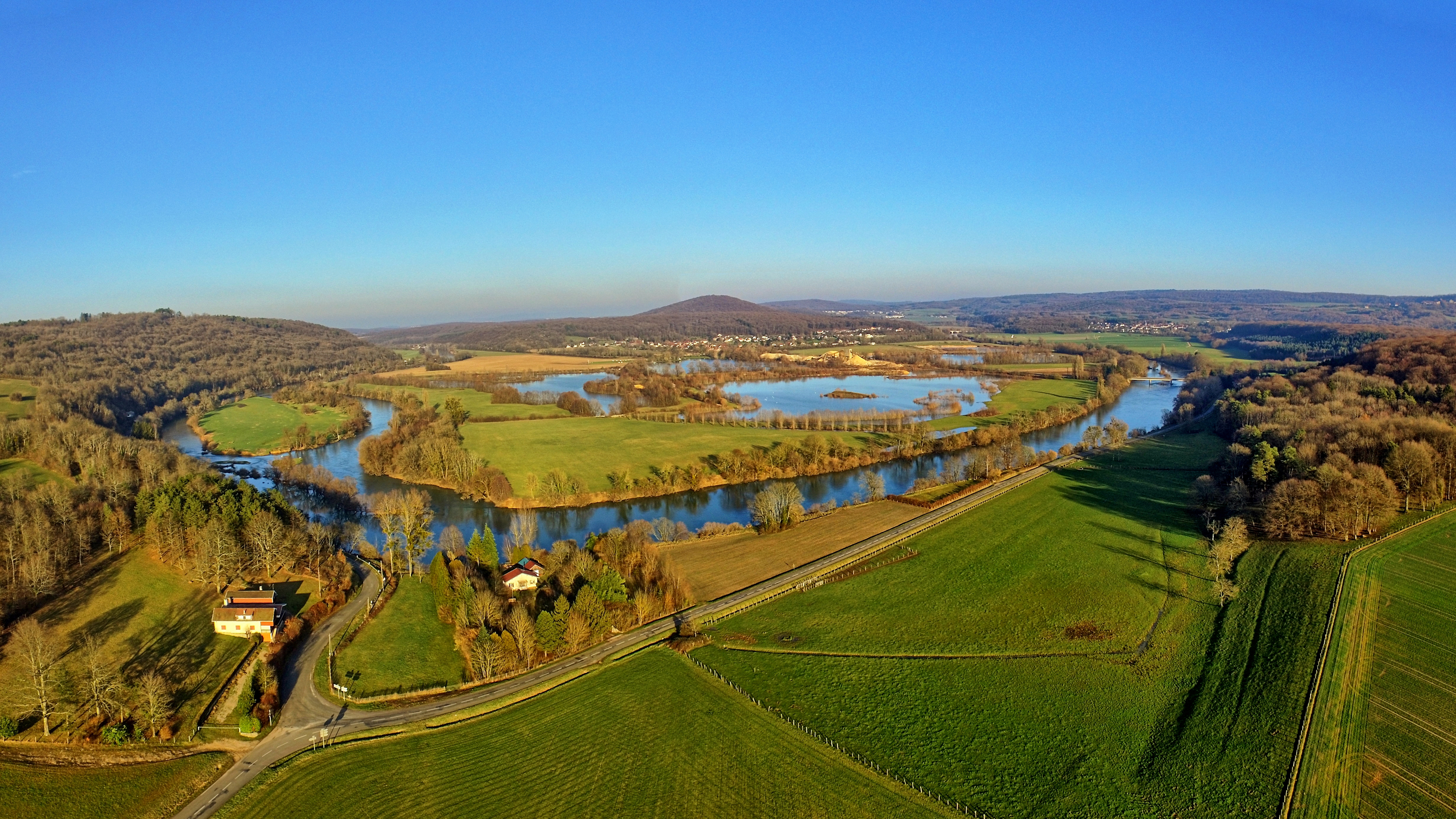 Boucle du Doubs au niveau d'Osselle